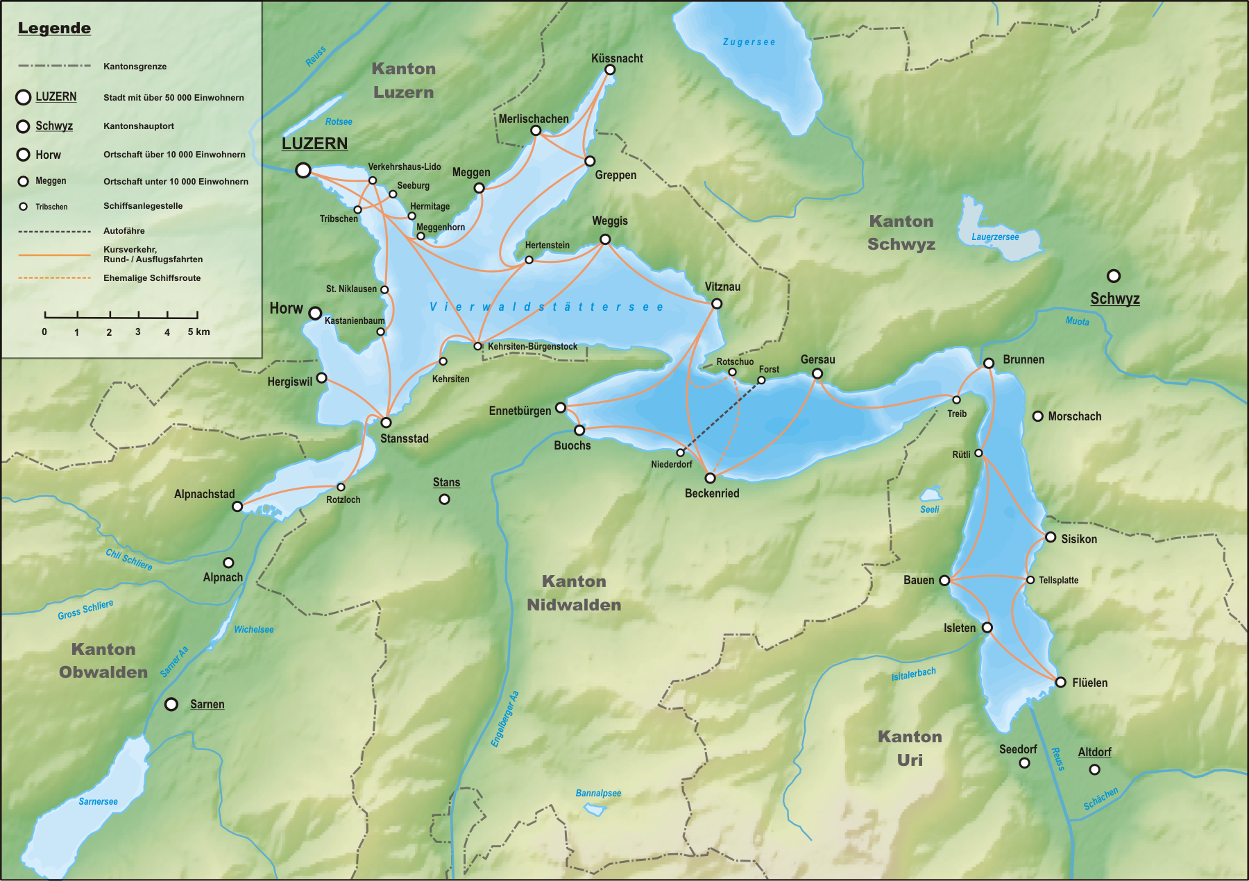 Schifffahrt auf dem Vierwaldstättersee